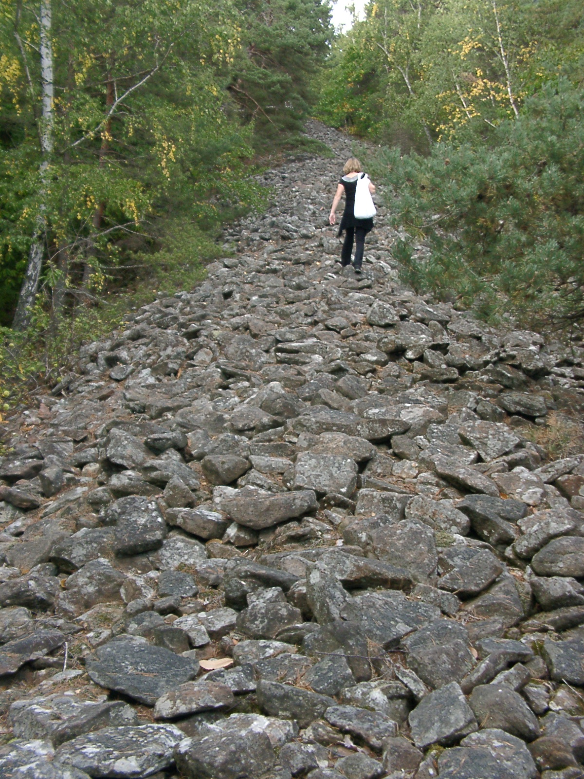 Heidenmauer. Keltischer Ringwall über Bad Dürkheim.